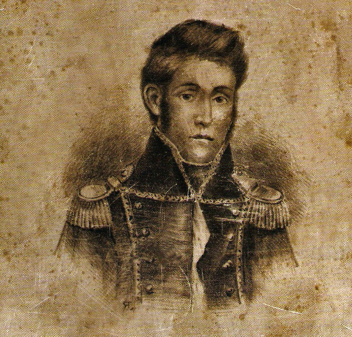 Felipe Pereyra de Lucena (1789-1811), piedra litográfica de 24x19 cm, Museo Histórico Nacional. Integró las milicias que actuaron contra las Invasiones Inglesas y luego integraron los primeros ejércitos revolucionarios. Murió en acción en el Alto Perú y su nombre está inscripto en la Pirámide de Mayo.